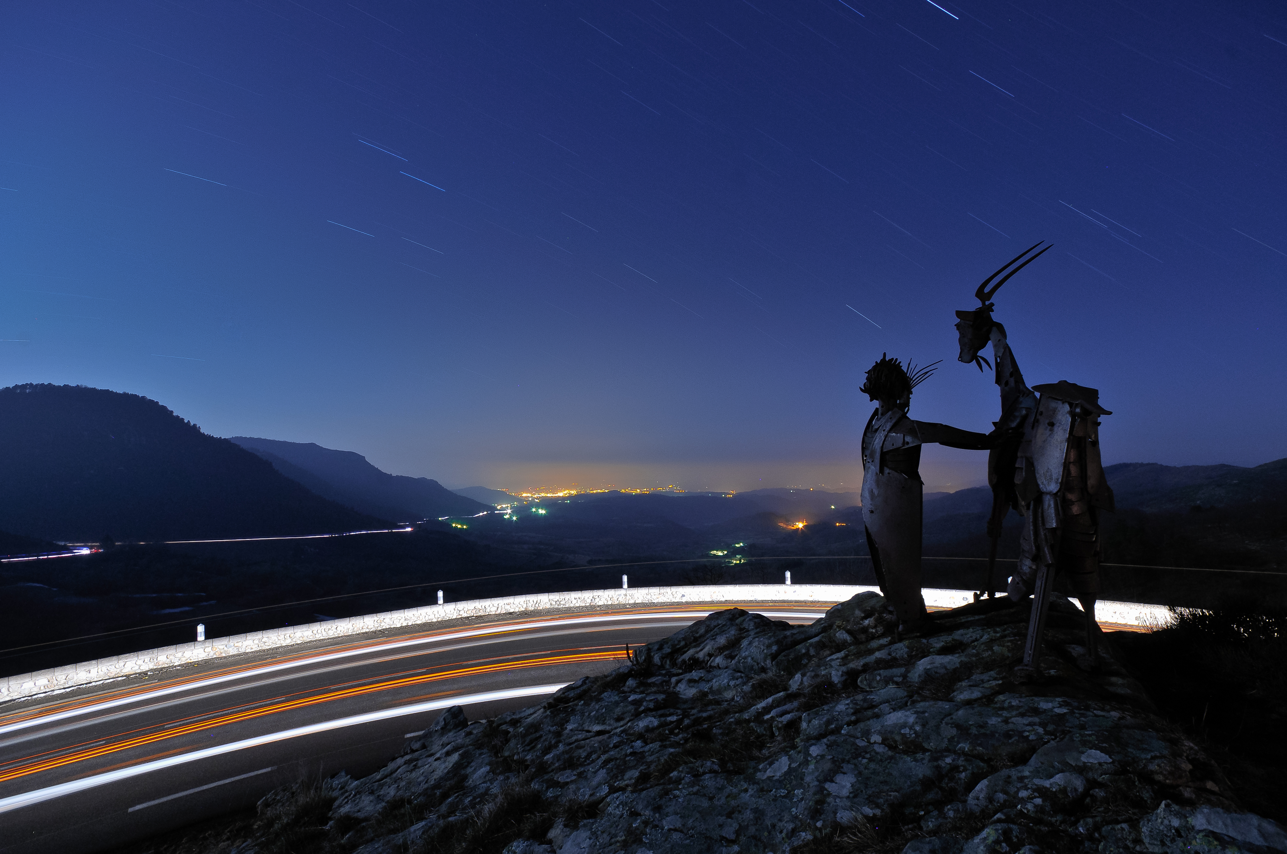 La chèvre en haut du col de l'Escrinet, de nuit avec Aubenas en fond.